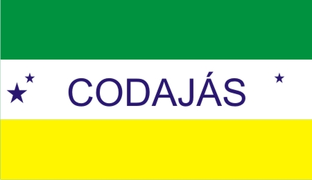 Bandeira de Codajás